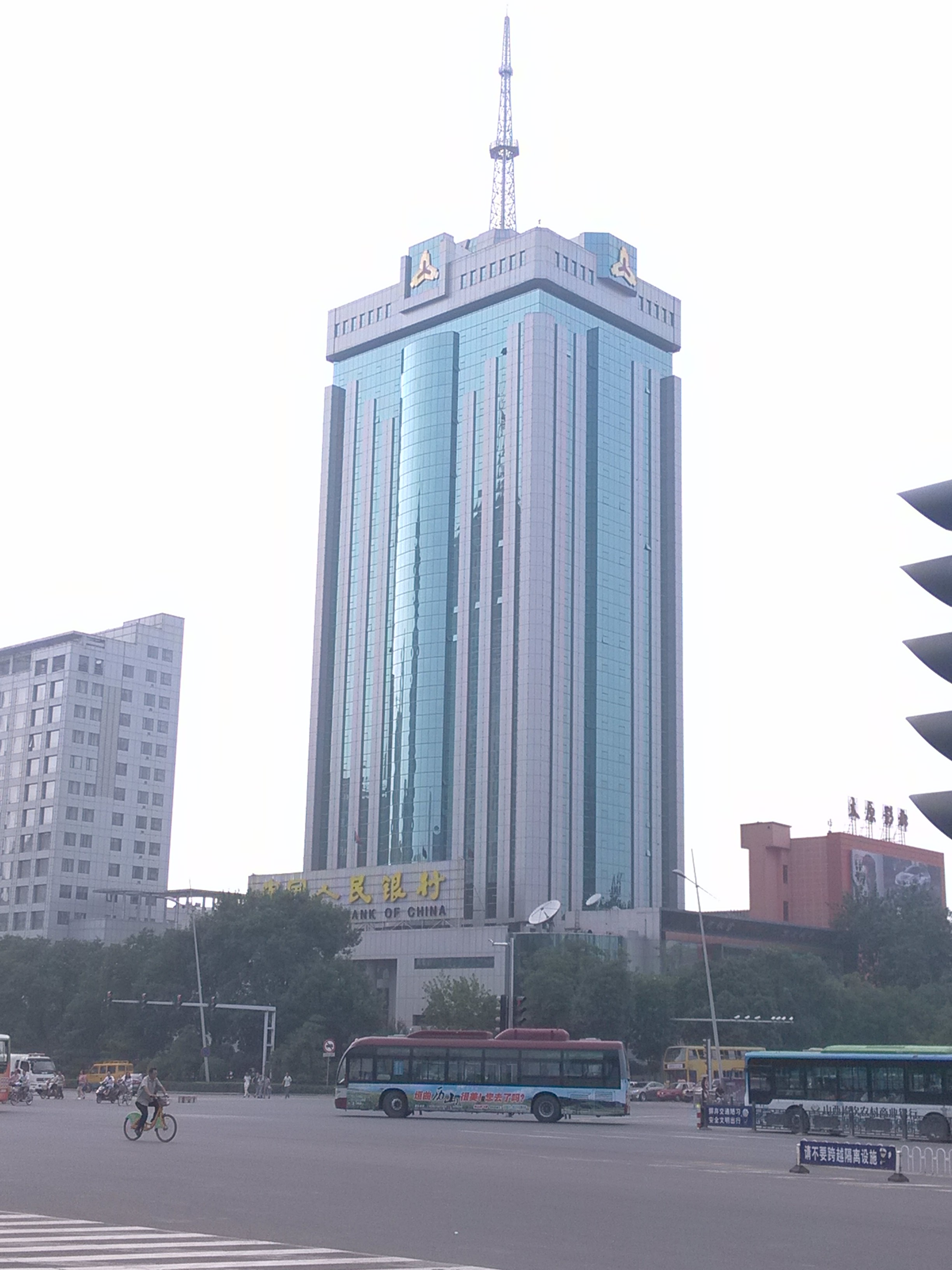 中国人民银行太原中心支行。